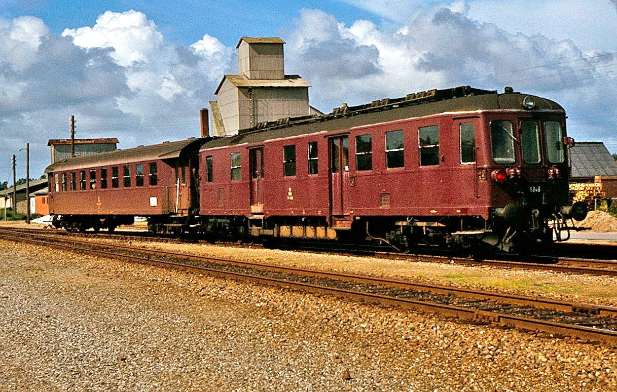 MO 1849